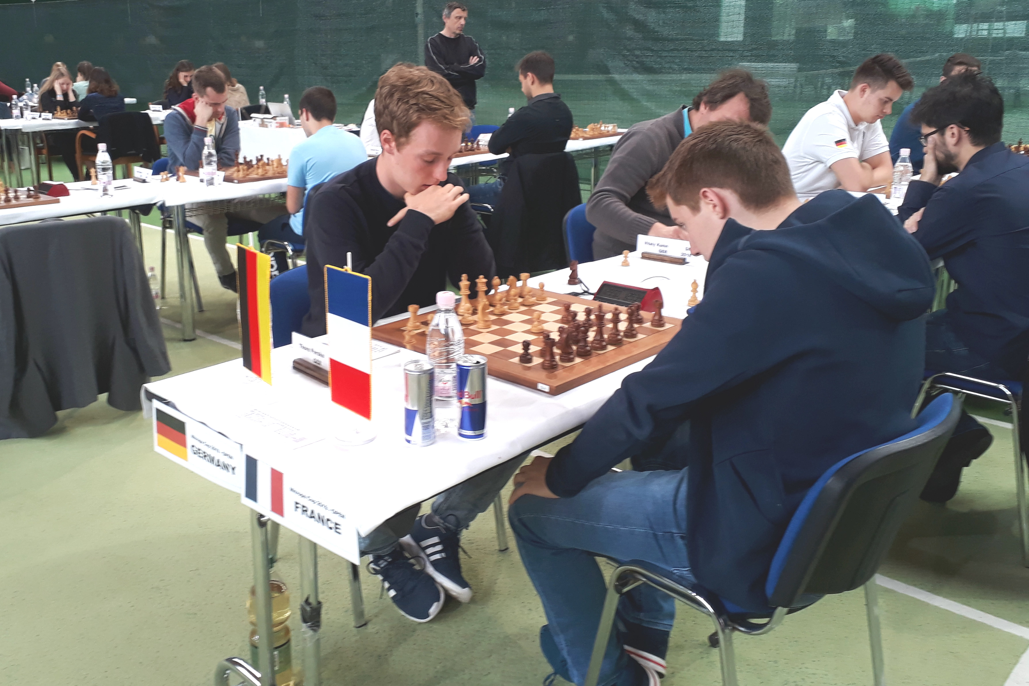 Deutschland-Frankreich: Thore Perske an Brett 1, Runde 4 Mitropa Cup 2019 in Radenci.